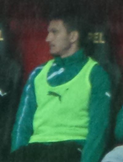 Serkan Yalçın